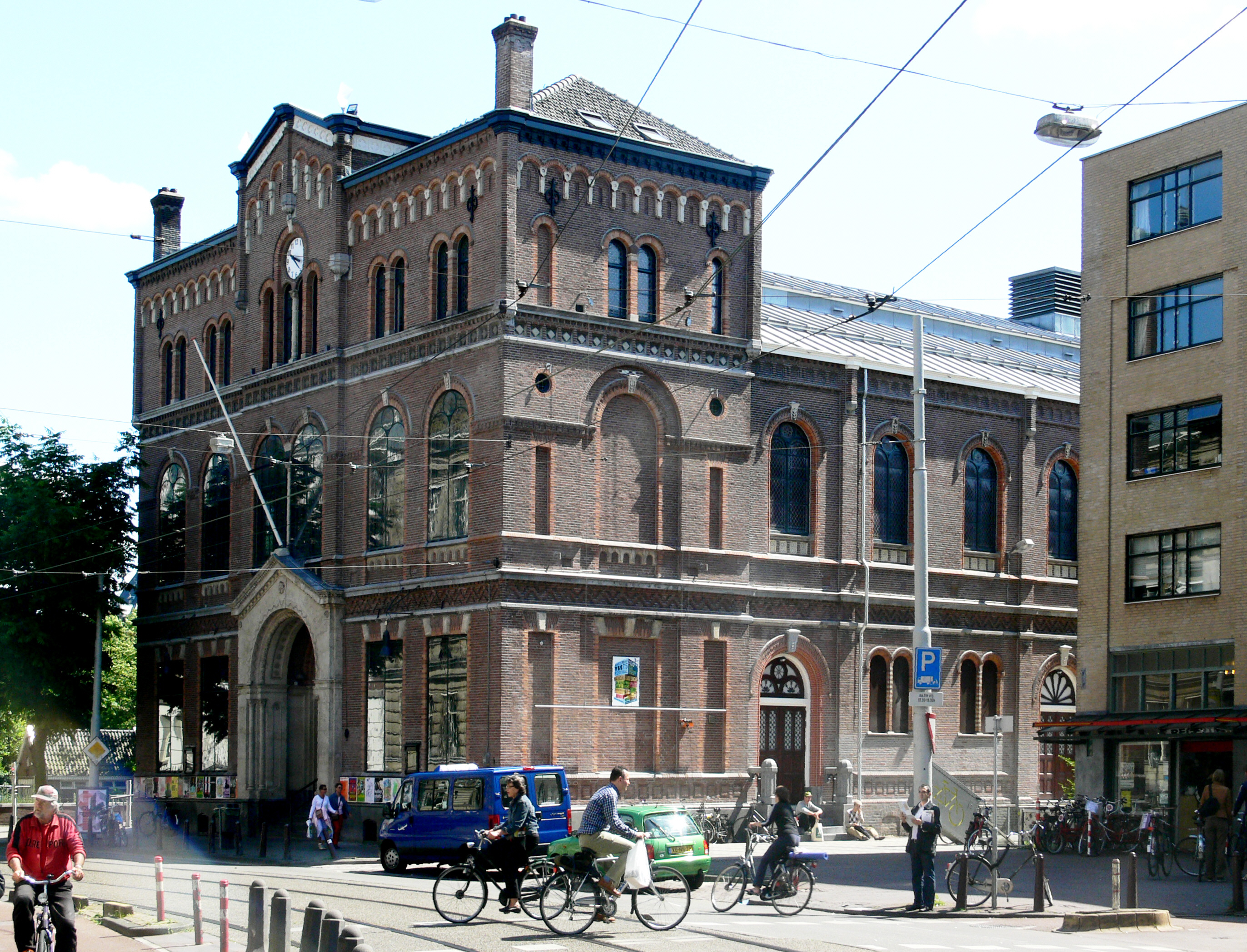 Concertzaal en cultureel centrum "Paradiso", Amsterdam